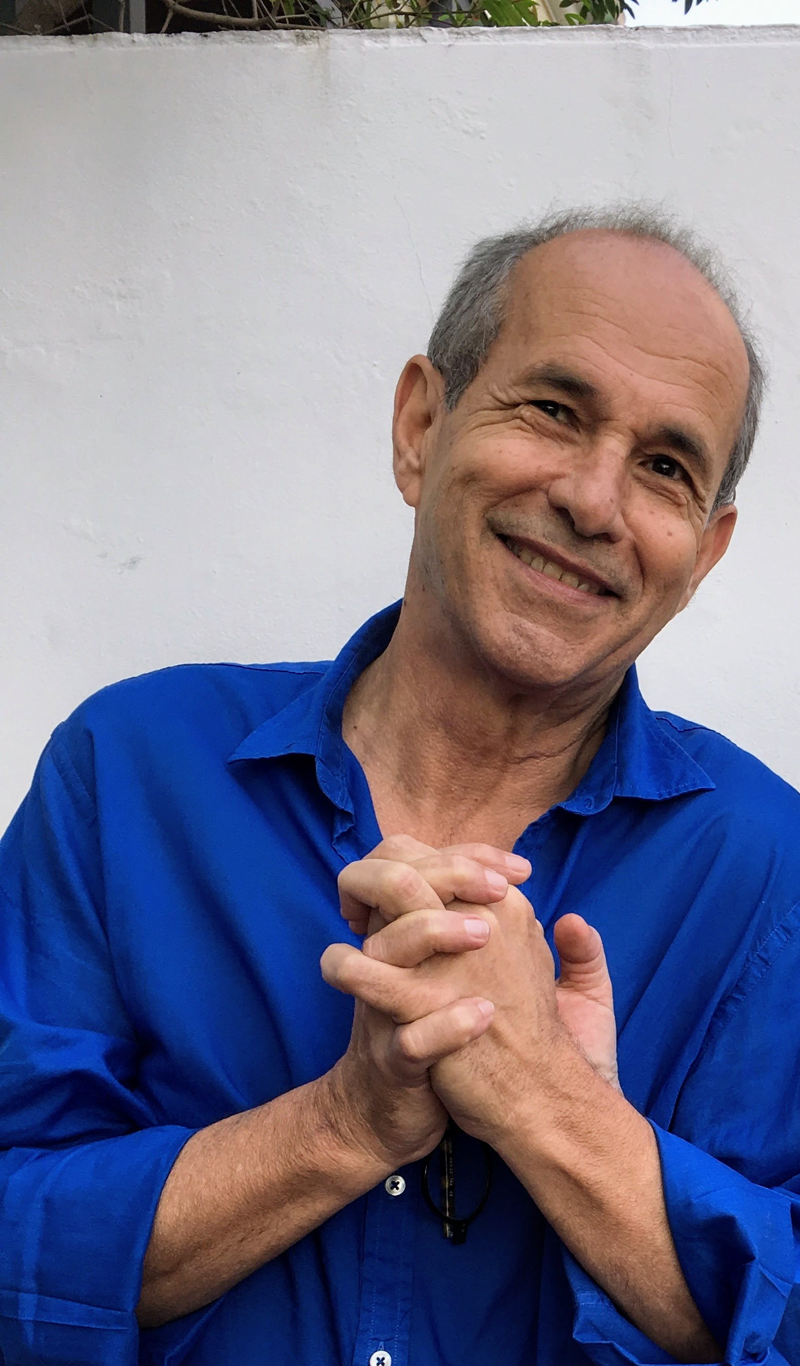 Foto de Ney Sant'Anna